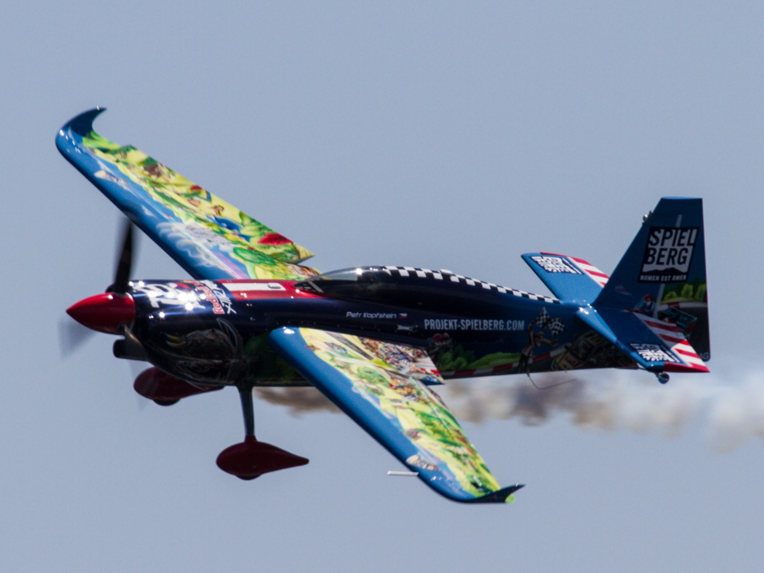 2017年レッドブル・エアレース・ワールドシリーズ 千葉 2位のペトル・コプシュタイン(チェコ)の機体